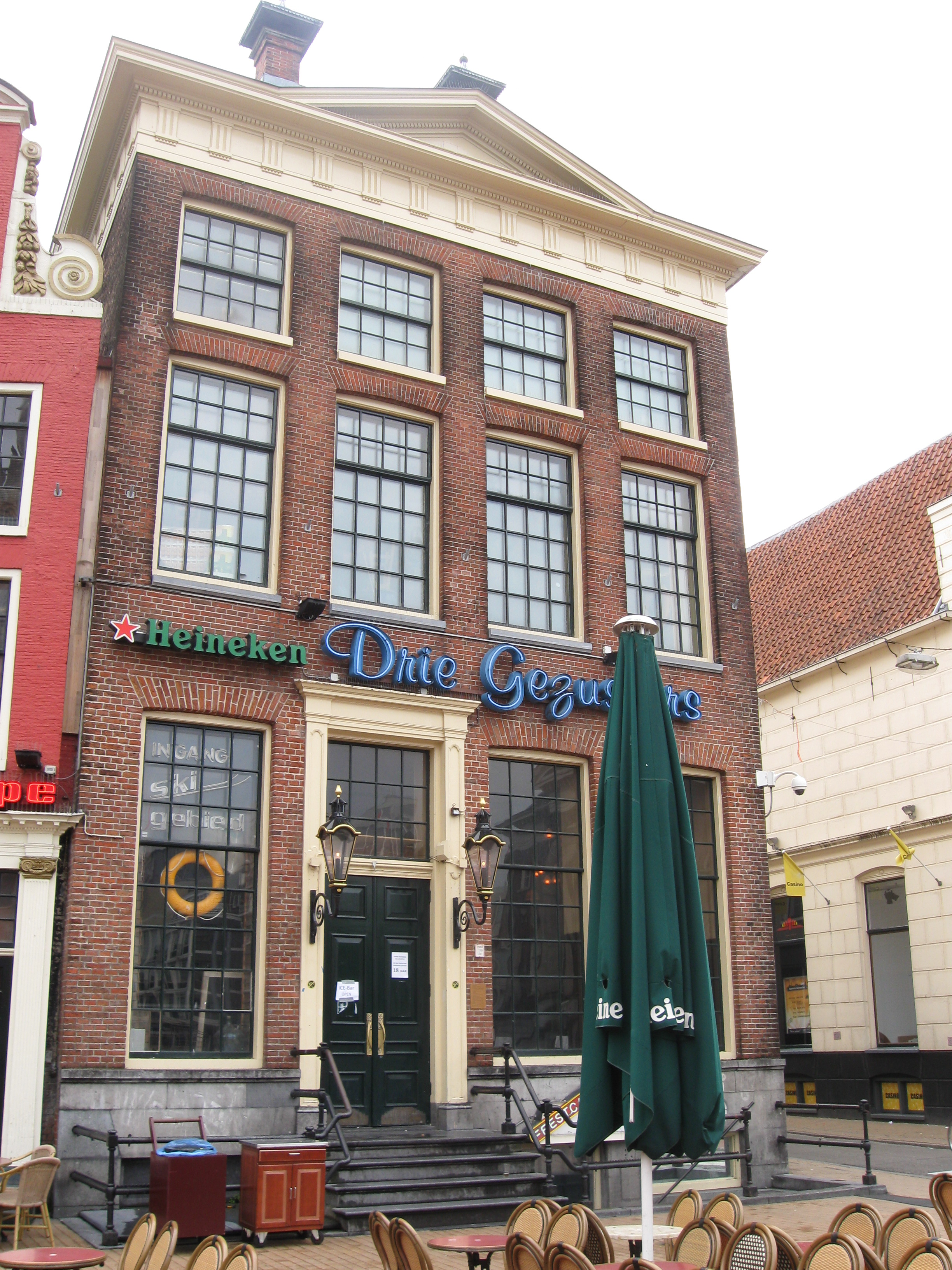 Groningen, Grote Markt 39